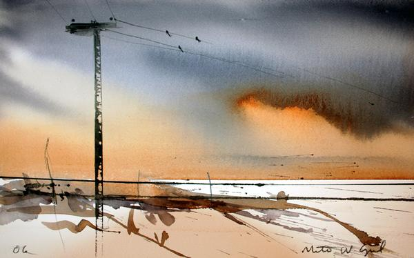 Akvarellen "Tre tar pause". Malt av Morten W. Gjul i 2007. I privat eie.